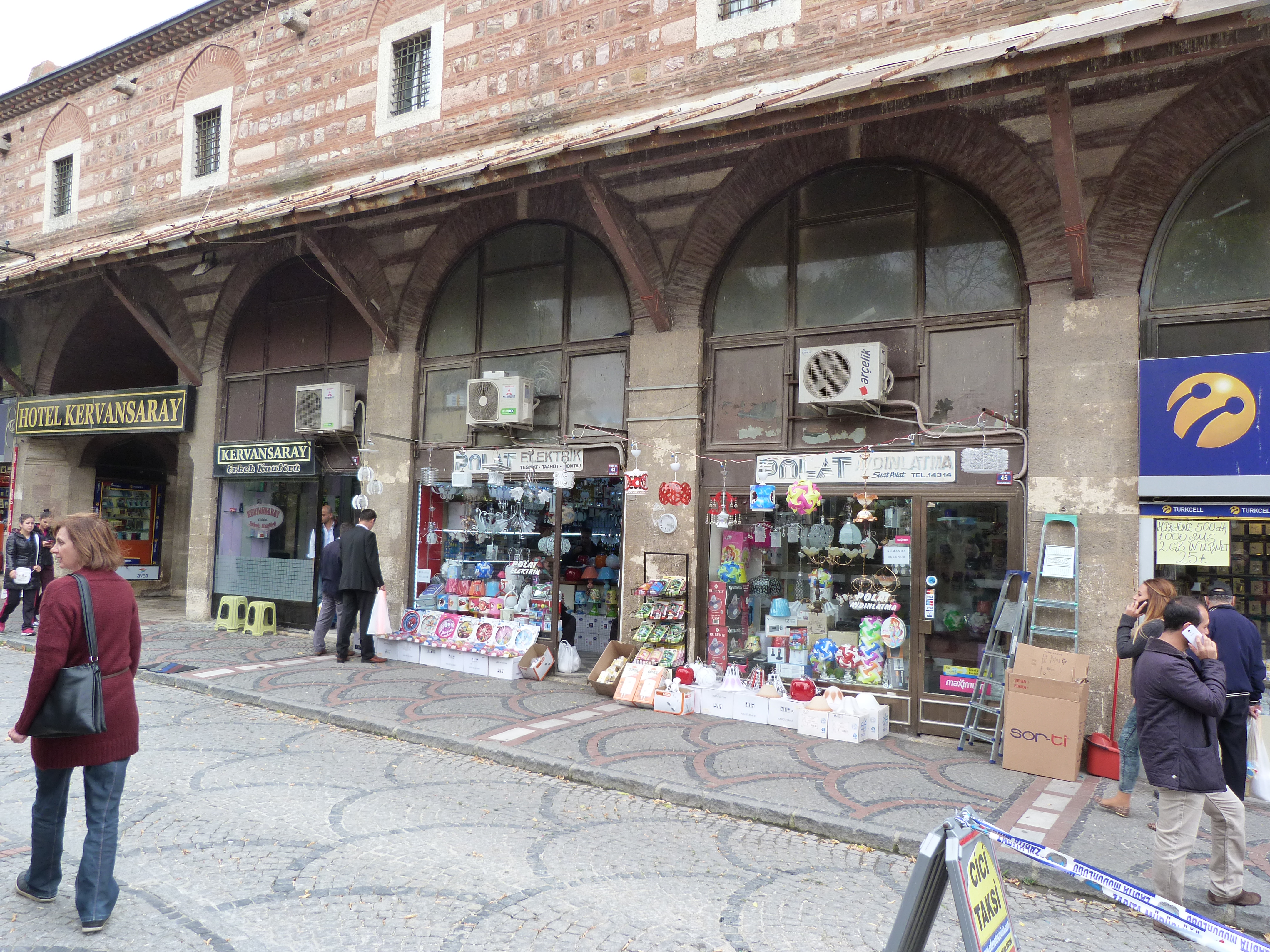 A felvétel 2014. október 22-én kedden készült Edirnében. ©© Derzsi Elekes Andor, Budapest, 2014, A kép egészben, vagy részletekben másolását, bármilyen úton történő sokszorosítását és felhasználását a szerző ellenérték nélkül, jogutódjaira is kihatóan megengedi. Az engedély kiterjed a kereskedelmi célú hasznosításra is. Kéri azonban nevének feltüntetését a felhasználás során. A Metapolisz sorozat valamennyi képe és filmje Creative Commons alatti valamint kereskedelmi - for profit - célra is felhasználható. Ajánlott hivatkozás: Derzsi Elekes Andor: Metapolisz DVD line